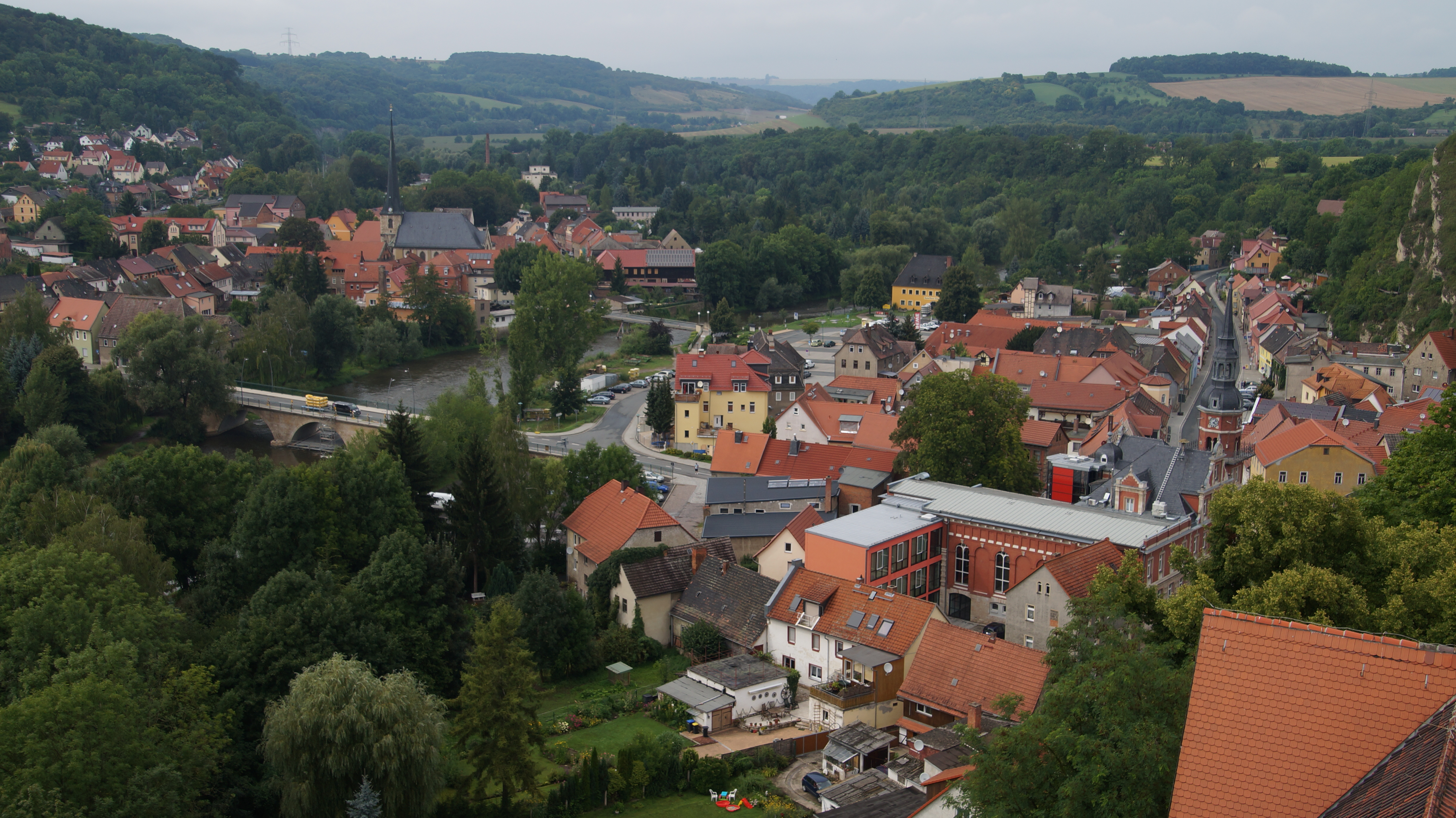 Blick vom Bergfried der Camburg saaleabwärts ins Saaletal; Blick auf die den Ort Camburg